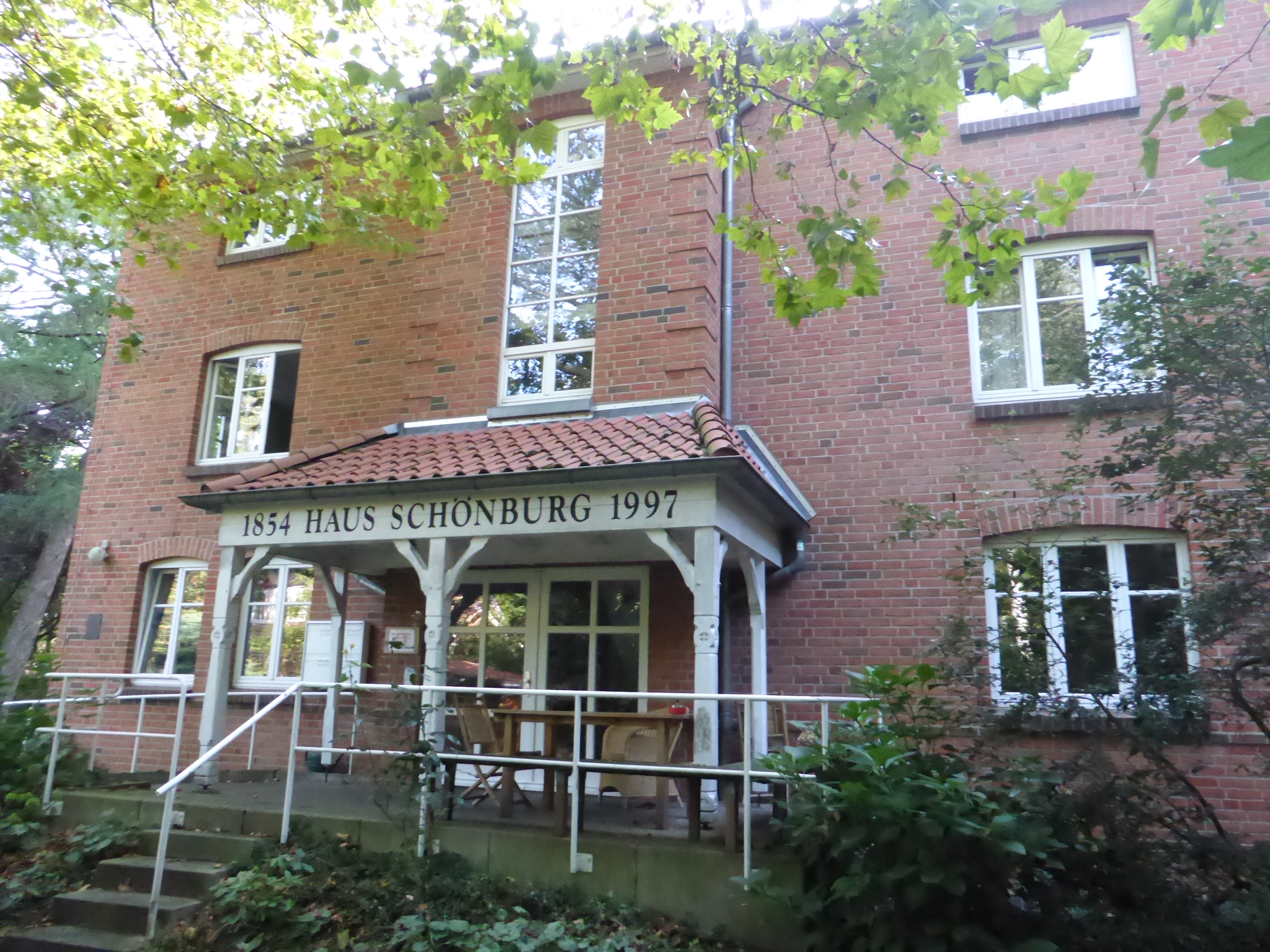 Haus Schönburg ist für mehrere Wohngruppen eingerichtet